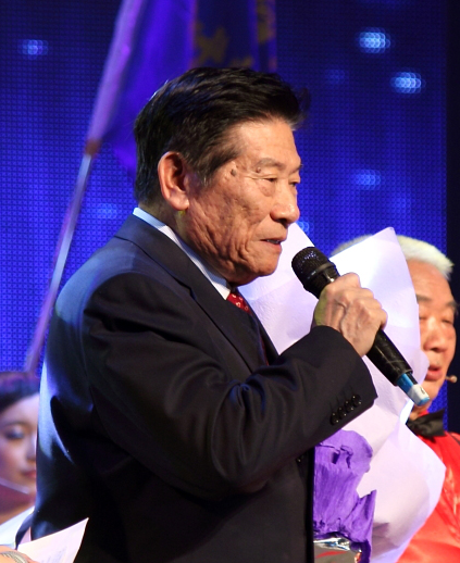 赵鹏大院士，拍摄于庆祝中国地质大学建校六十周年文艺晚会。